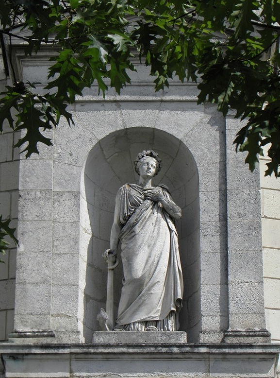 Statue de l'Espérance par Jean-Baptiste Barré (1804-1877), ornant la chapelle funéraire Saint-Michel de l'Espérance à l'entrée du cimetière du Nord à Rennes (35).